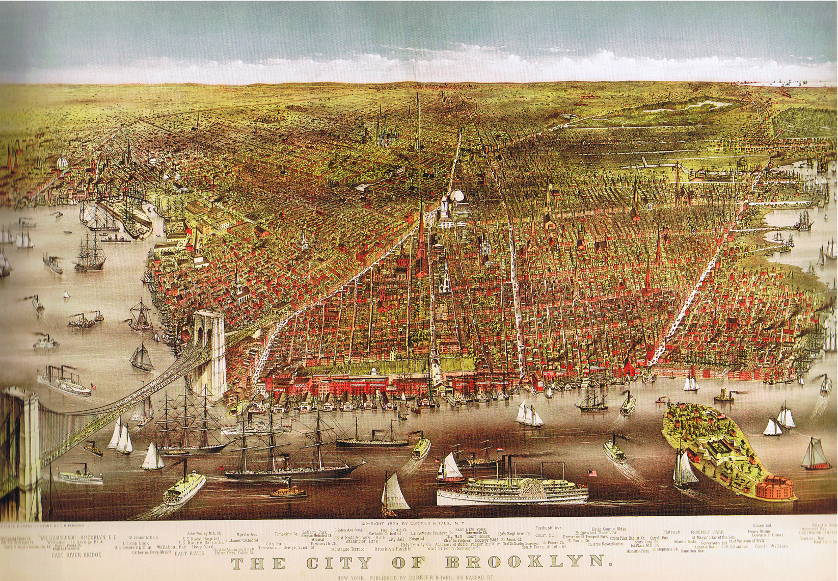 View of Brooklyn, 1879